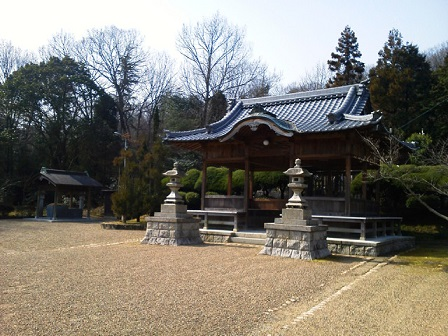 おやさまのお墓（2）